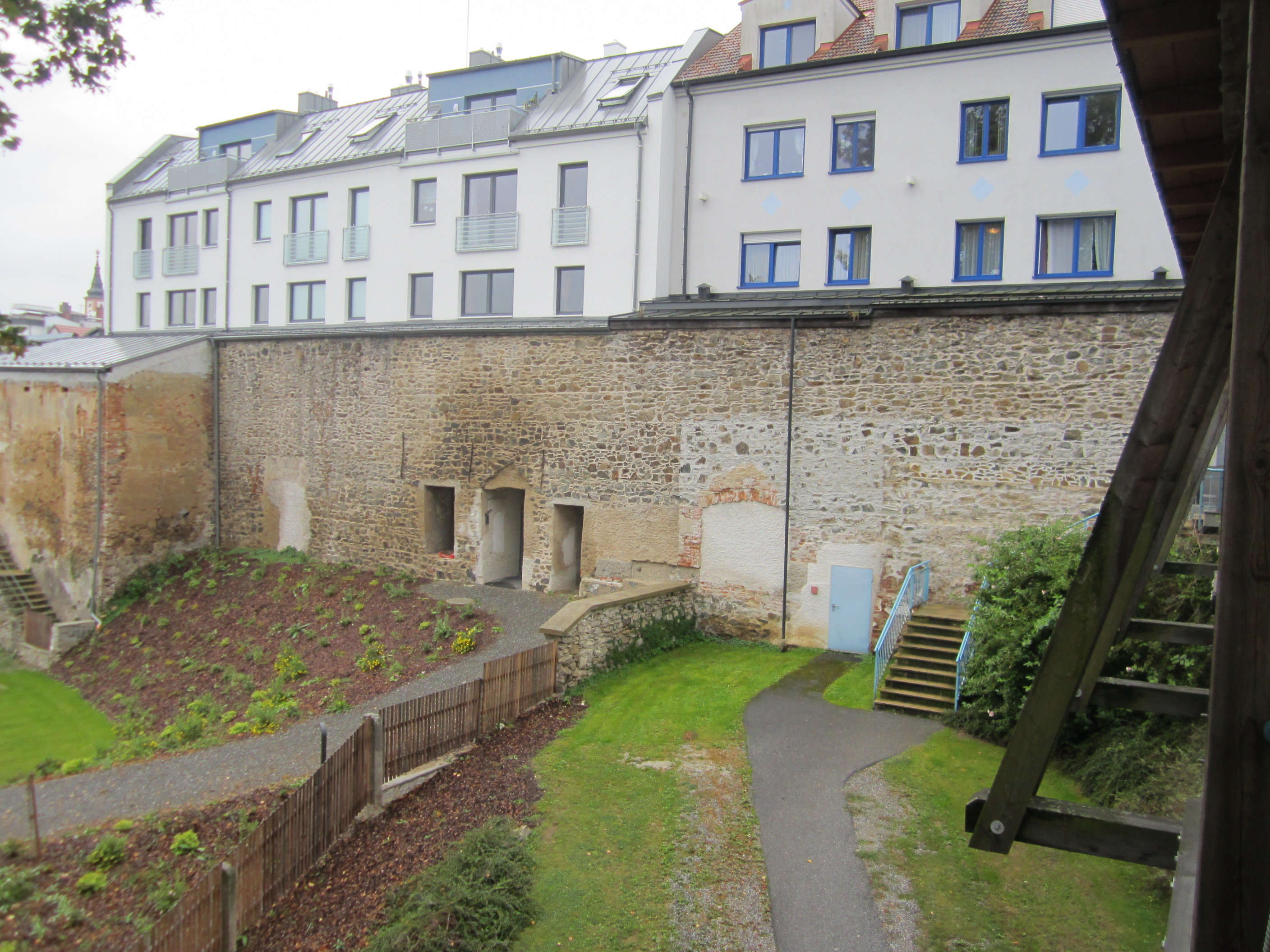 Object location48° 48′ 53.35″ N, 15° 17′ 17.52″ E